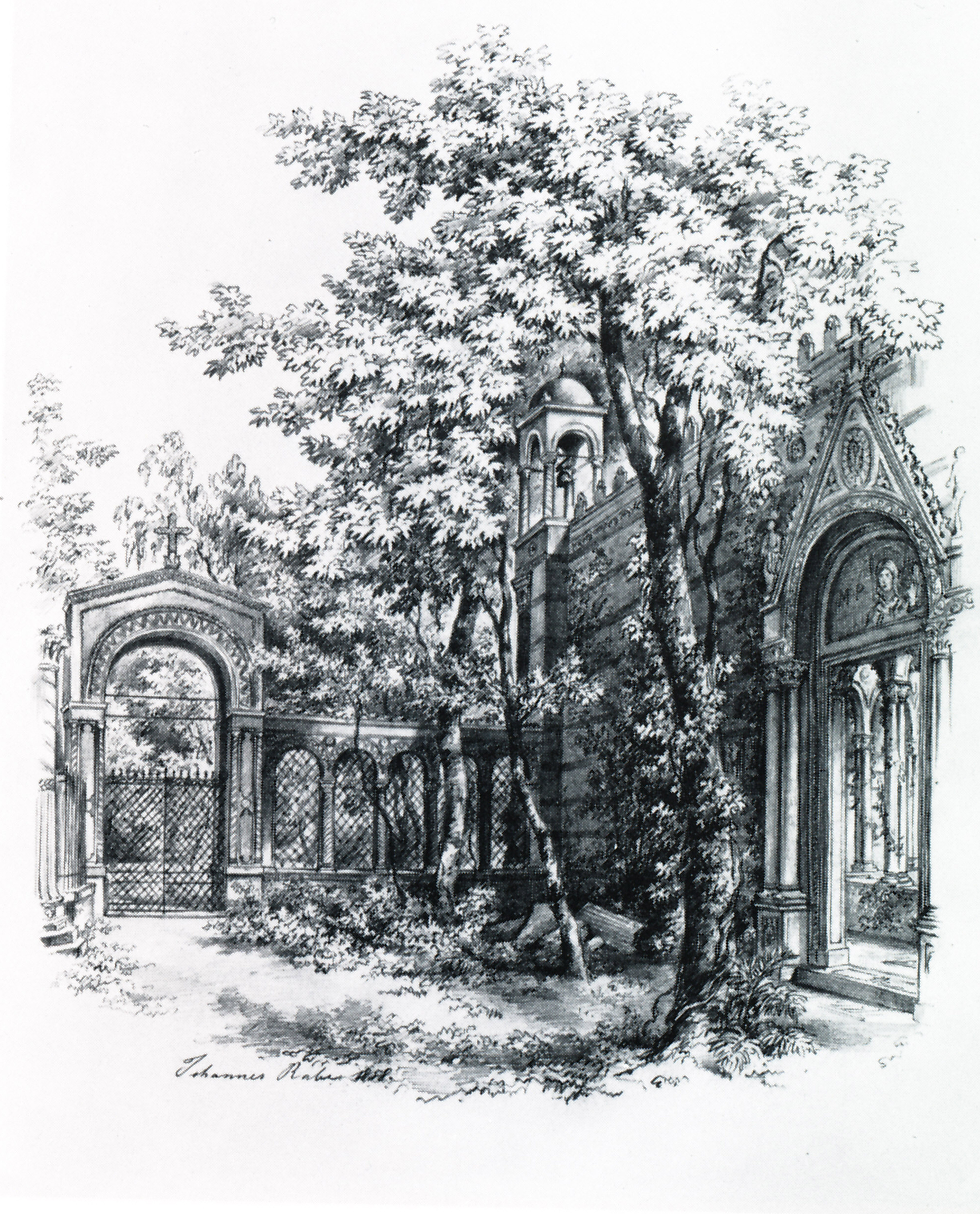 Johannes Rabe, der Vorhof des Klosterhofs in Klein-Glienicke, 1858